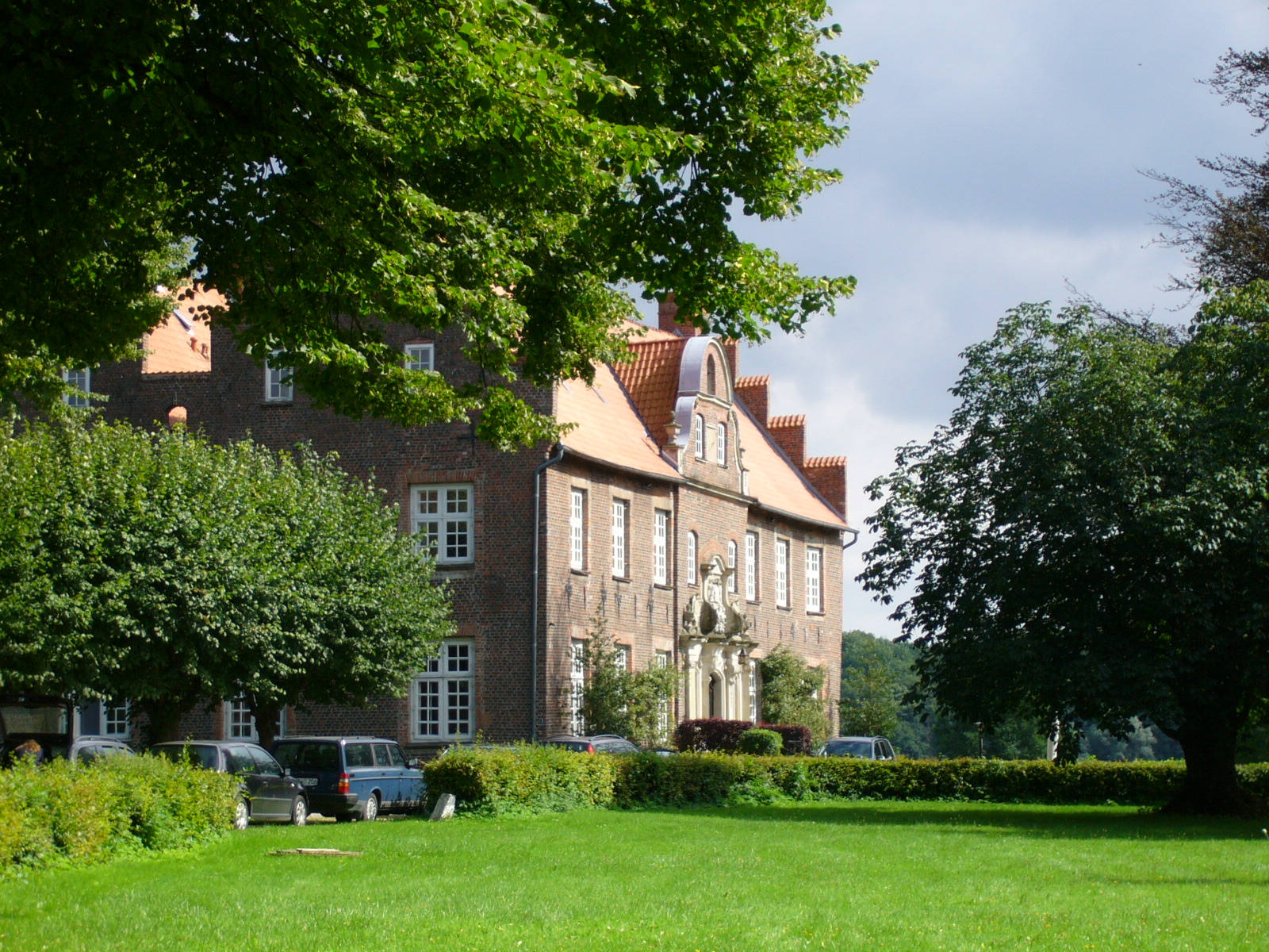 Herrenhaus des Gutes Wensin am Wardersee. Das Doppeldachhaus wurde 1642 gebaut.